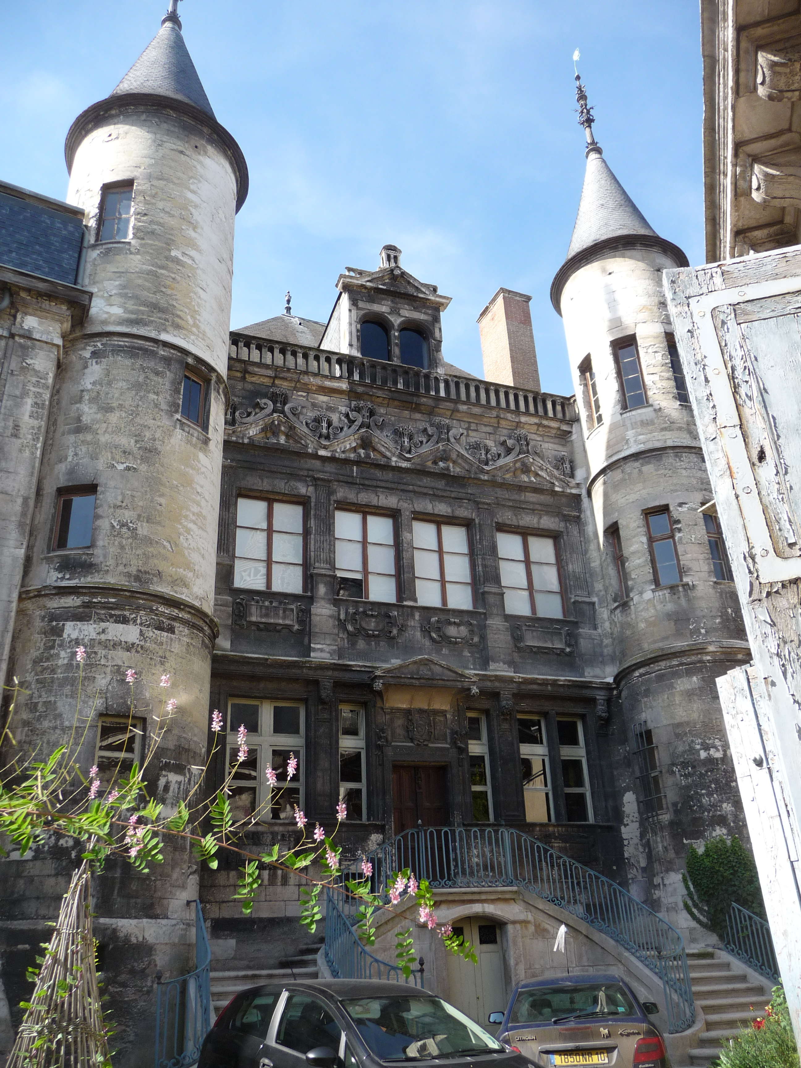 Cet hôtel se caractérise en particulier par la symétrie de ses tourelles à toits conique avec épis en plomb. Celle de gauche, plus grosse renferme un escalier. .